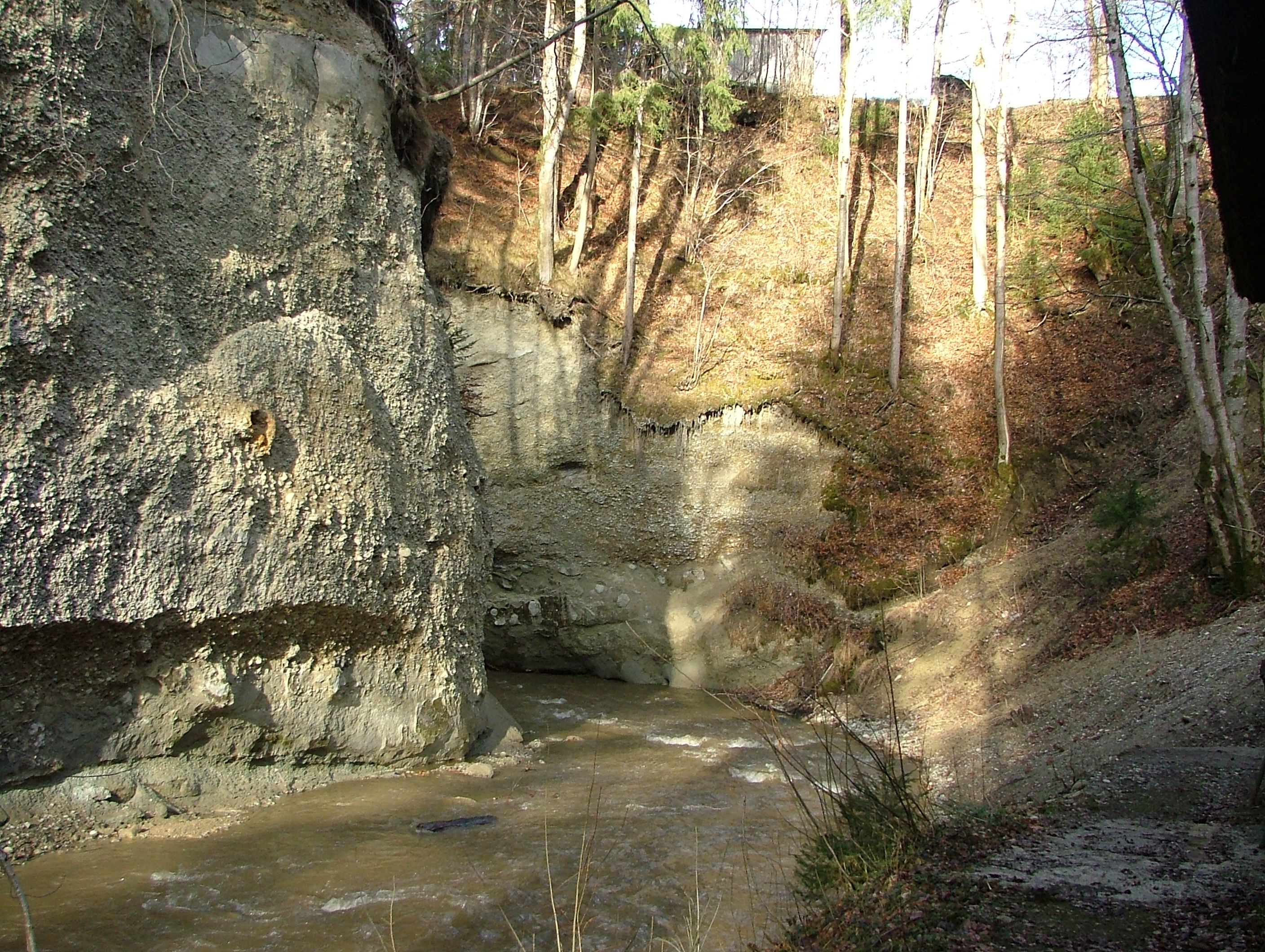 Rohrach1.jpg